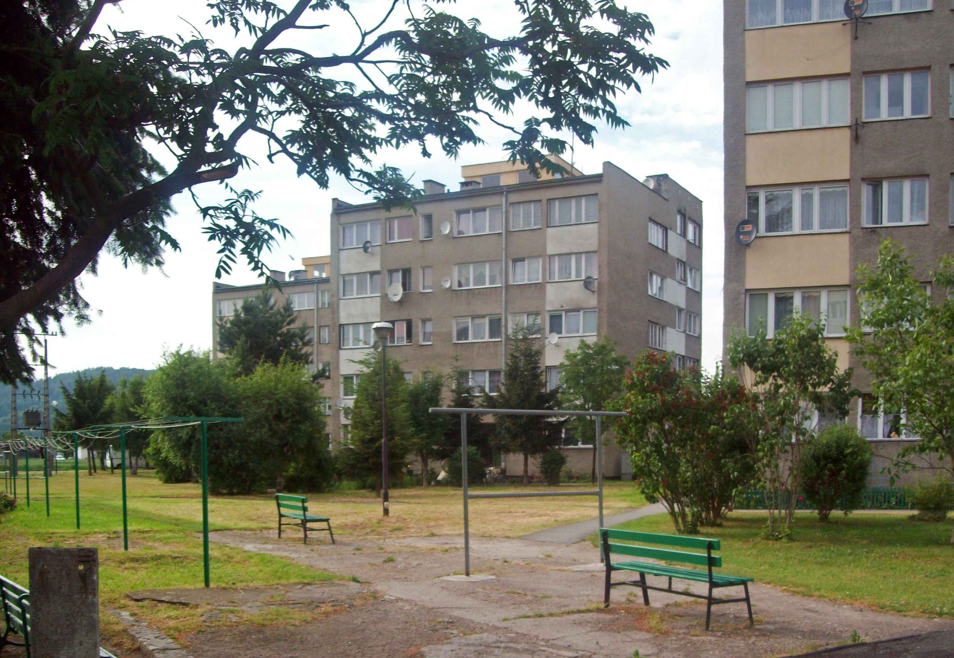 Widok ogólny na osiedle w wielkiej pyty w Ołdrzychowicach Kłodzkich